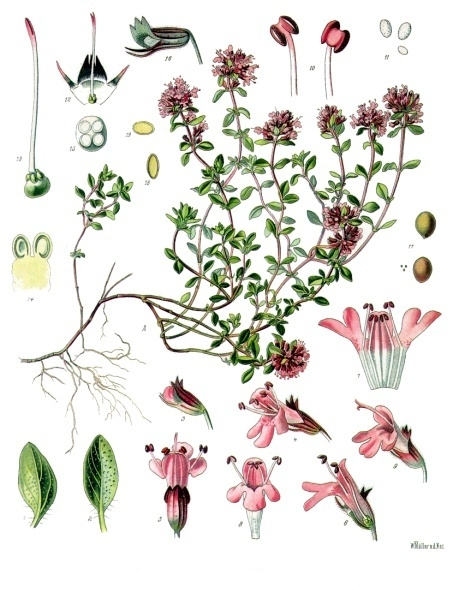 Sand-Thymian. A blühende Pflanze in nat. Gr.; 1 u. 2 Blätter, desgl.; 3 Knospe, vergrössert; 4 u. 5 Blüthe von verschiedenen Seiten, desgl.; 6 dieselbe im Längsschnitt, desgl.; 7 aufgeschnittene Krone mit Staubgefässen, desgl.; 8 abgefallene Krone nach der Befruchtung, desgl.; 9 Blüthe mit fehlenden Staubgefässen, desgl.; 10 Staubgefässe, desgl.; 11 Pollen, desgl.; 12 Kelch mit Stempel, desgl.; 13 Stempel, desgl.; 14 Scheibe mit Fruchtknoten im Längsschnitt, desgl.; 15 Fruchtknoten im Querschnitt, desgl.; 16 Frucht mit Fruchtkelch, desgl.; 17 Nüsschen, natürl. Grösse und vergrössert; 18 u. 19 Same im Längs- und Querschnitt.